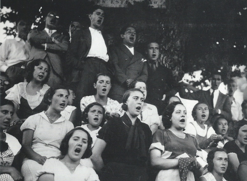 El Coro del Pueblo de las Misiones Pedagógicas, durante una actuación al aire libre (hacia 1932).